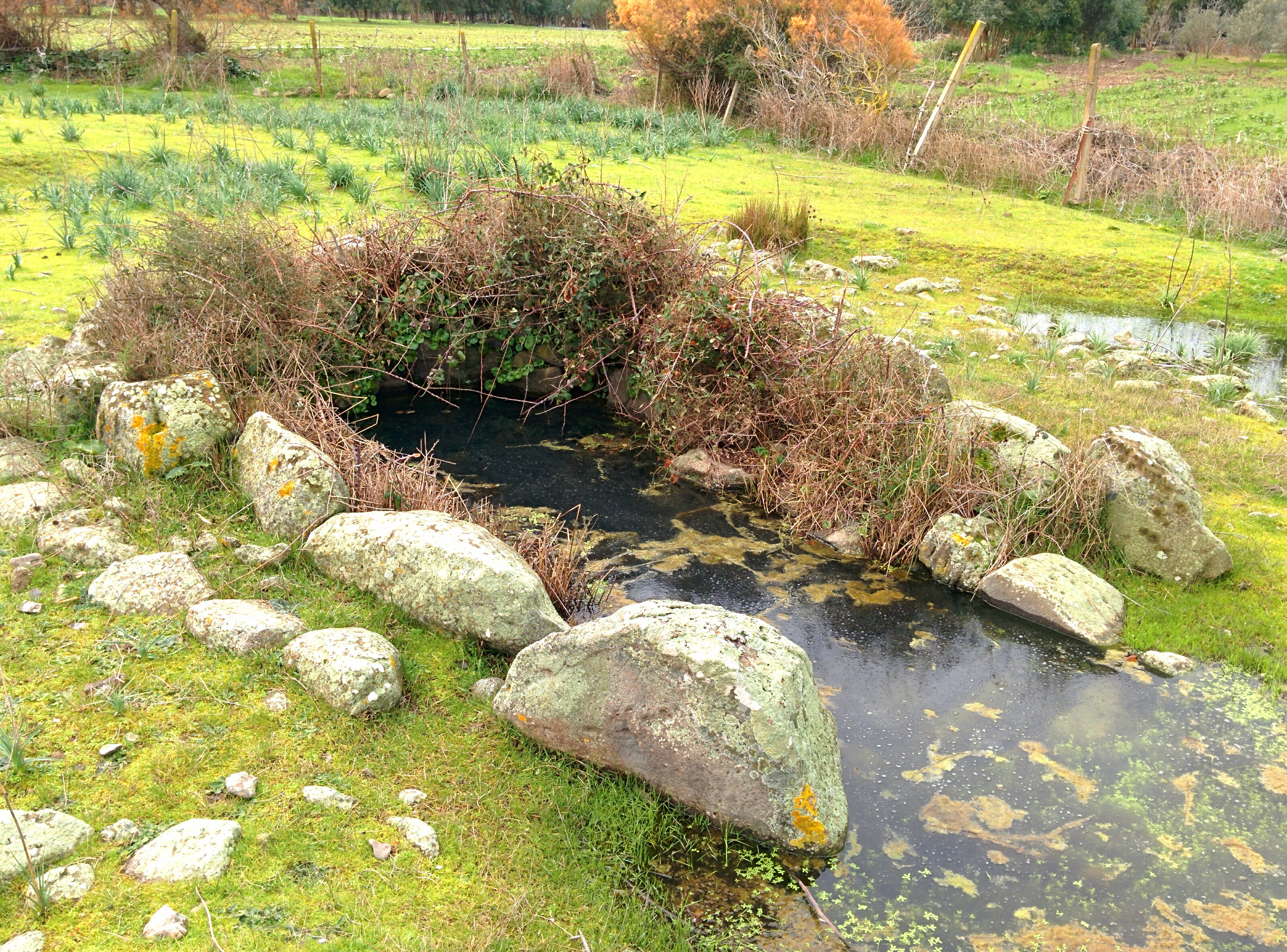 Pozzo nuragico Sa Mitza de Su Nieddinu- Guspini